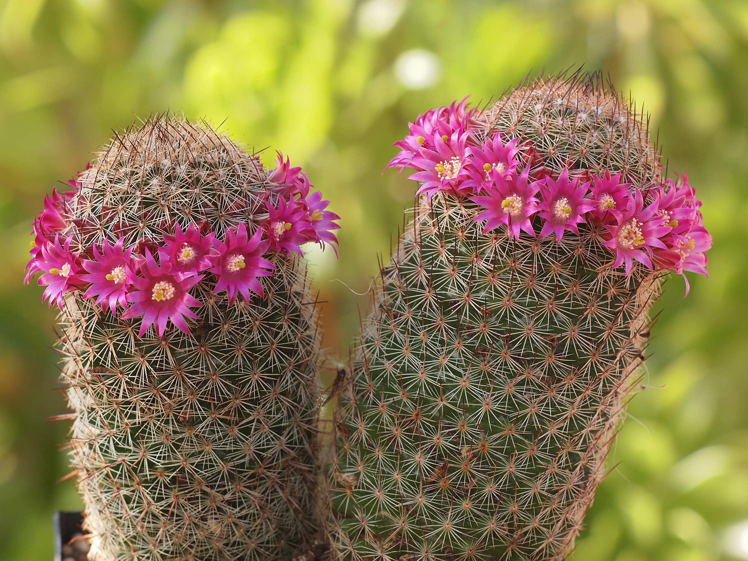 E-PL2 mit Canon Macro Lens FD 4/100